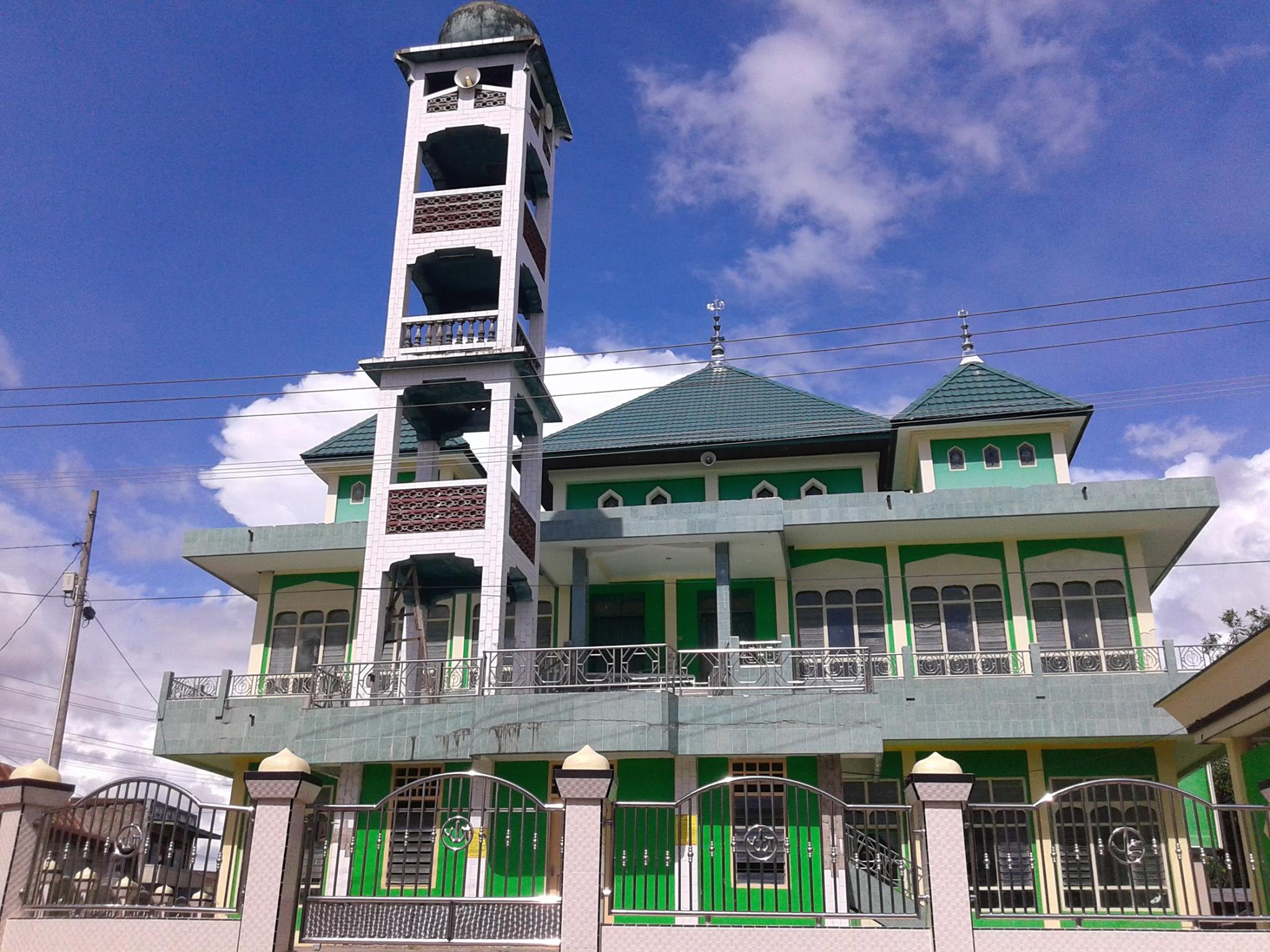 Masjid Besar Taqwa Ganra